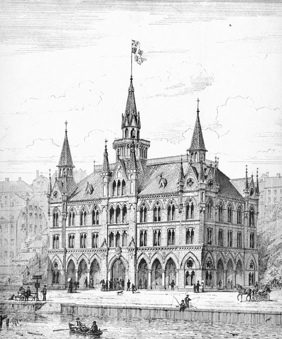 Mariahissen, perspektivritning av O. A. Mankell